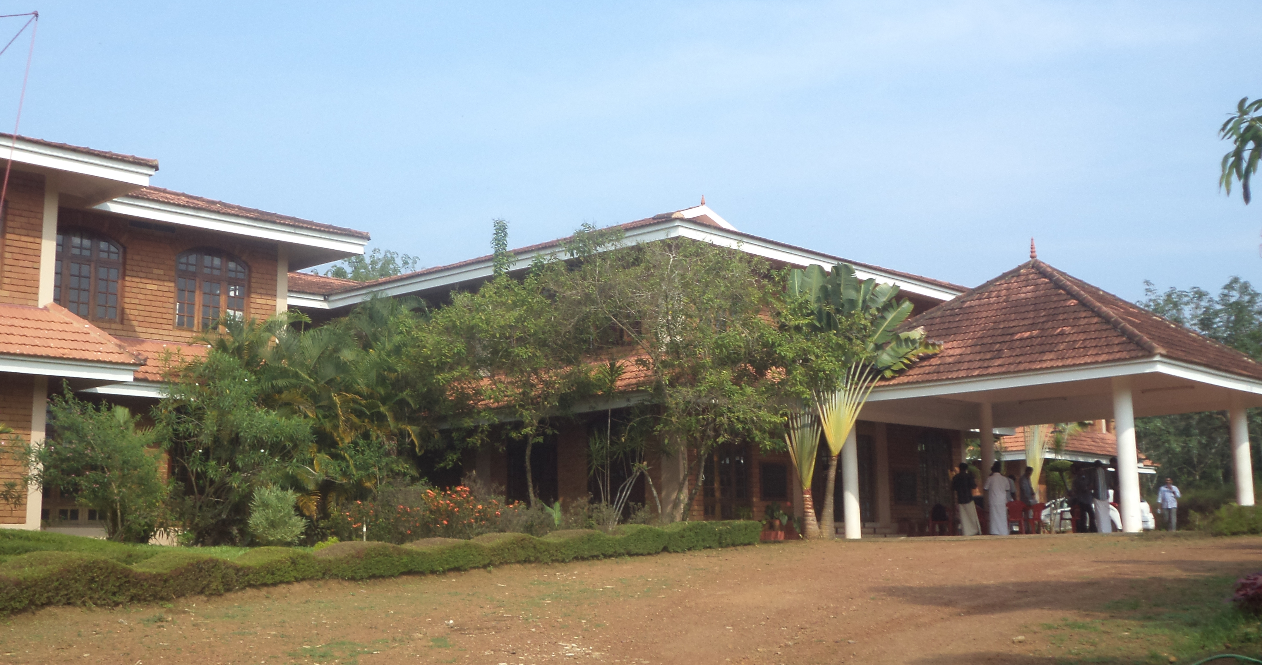 തിരുവനന്തപുരത്ത് വിളപ്പില്‍ശാലയിലുള്ള ഇ.എം.എസ് അക്കാദമി